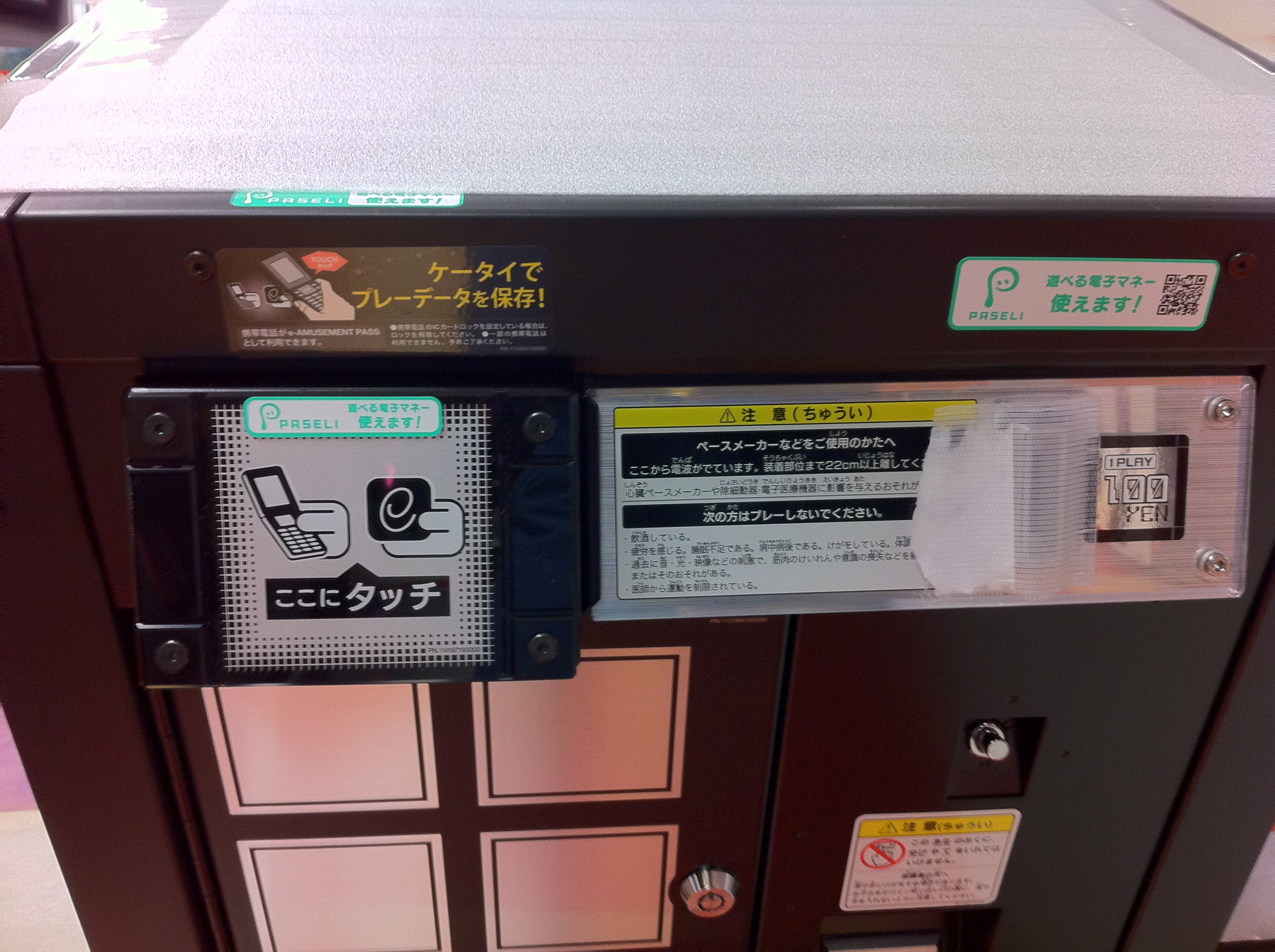 jubeat copiousアップデート後のe-amusement passのデバイス。